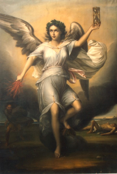 Gheorghe Tattarescu - Nemesis, zeiţa răzbunarii - Compoziţie alegorică reprezentând-o pe Nemesis, zeiţa răzbunării şi a dreptei măsuri, văzută din faţă, având piciorul drept îndoit şi sprijinit pe o roată, Muzeul Municipiului Bucureşti, 152x102 cm.